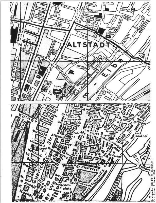 Magdeburg, Stadtplan Zentralbild Biscan Qu 7.1.1964 Anläßlich des Jahrestages der Zerstörung Magdeburgs: Am 16. Januar 1945, enige Tage vor Kriegsende, erfolgte der große angloamerikanische Bombenangriff, dem fast die gesamte Innenstadt Magdeburgs zum Opfer fiel. 800 Bomber luden 1000 Luftminen, 12000 Sprengbomben und 200000 Brandbomben über derStadt ab. Magdeburg hatte nach jener grauenvollen Nacht 16000 Tote, 24648 Verwundete und 244560 Obdachlose zu beklagen - fast das ganze Stadtzentrum lag in Trümmern.- Der Wiederaufbau der zerstörten Elbestadt, für den die Regierung der DDR alljährlich viele Millionen DM zur Verfügung stellt, hat besonders in der letzten Zeit große Fortschritte gemacht. UBz: Der Stadtplan von 1946 (unten) zeigt im Stadtzentrum eine Vielzahl von Gassen und Gäßchen. Derselbe Ausschnitt aus dem Stadtplan von 1960 (oben) zeigt bereits deutlich große, klare und übersichtliche Strassenzüge, das Ergebnis einer modernen Stadtplanung.